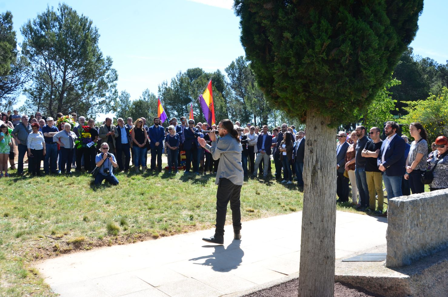 L'artista Nel·lo C en un homenatge a les victimes del nazisme amb les màximes autoritats de la ciutat de Sabadell.